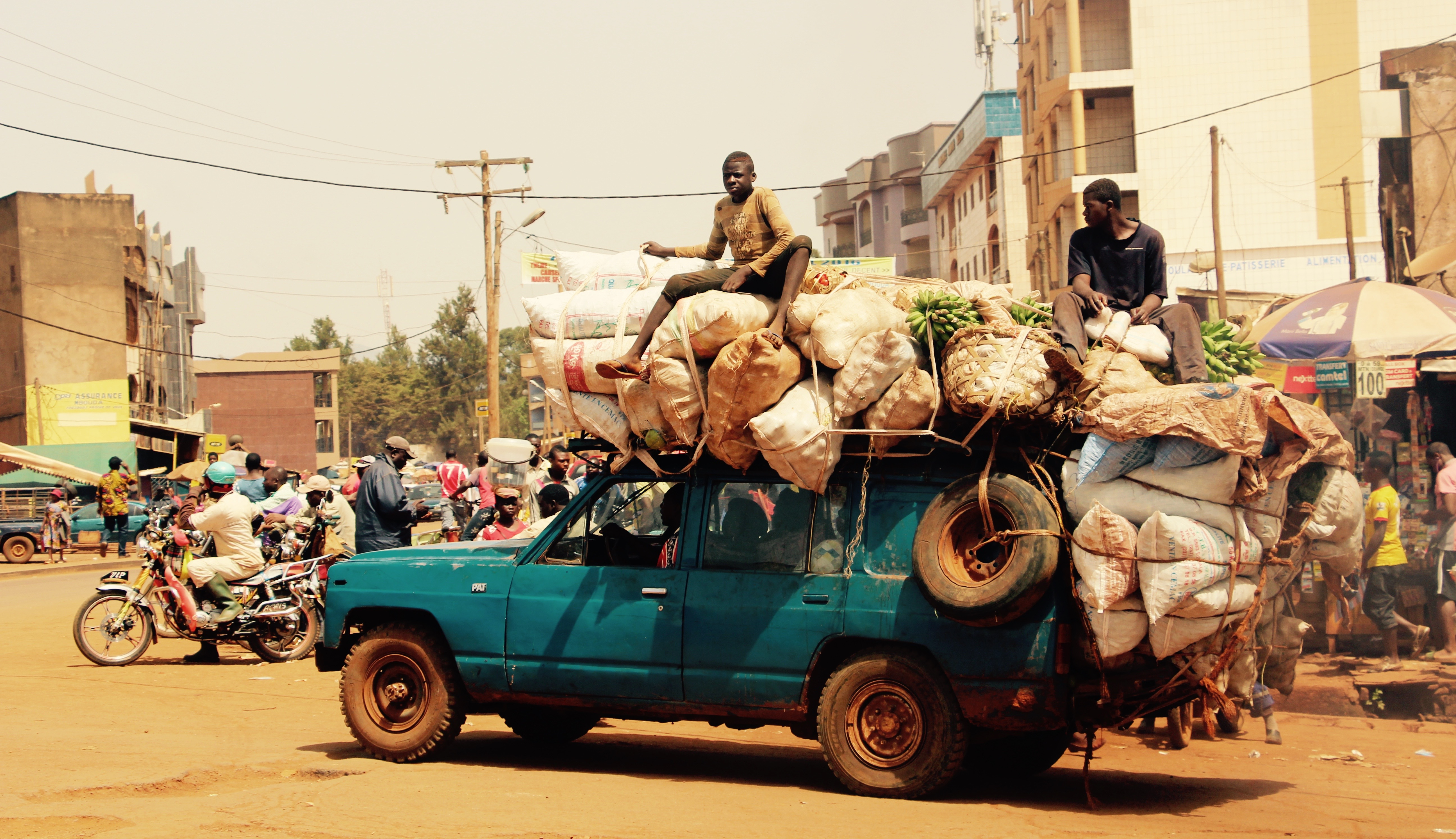 Voiture chargée de marchandises au centre ville de Mbouda dans l'Ouest du Cameroun This is an image with the theme "Africa on the Move or Transport" from: Cameroon